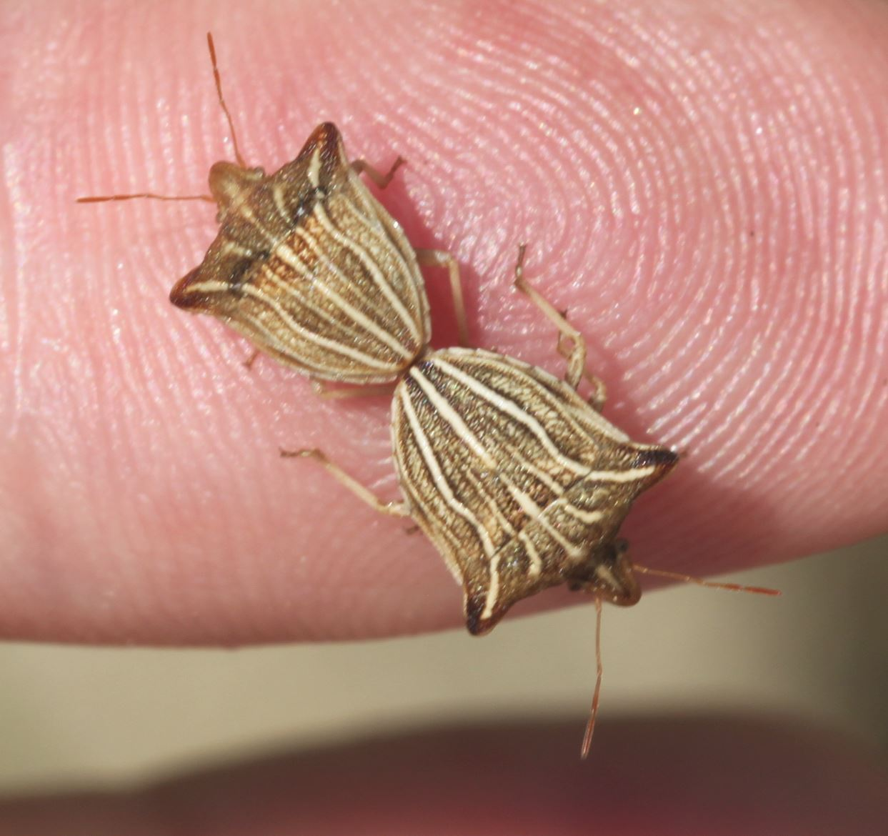 Paarung von Ancyrosoma leucogrammes am 30. Juni 2019 an der Côte d’Azur